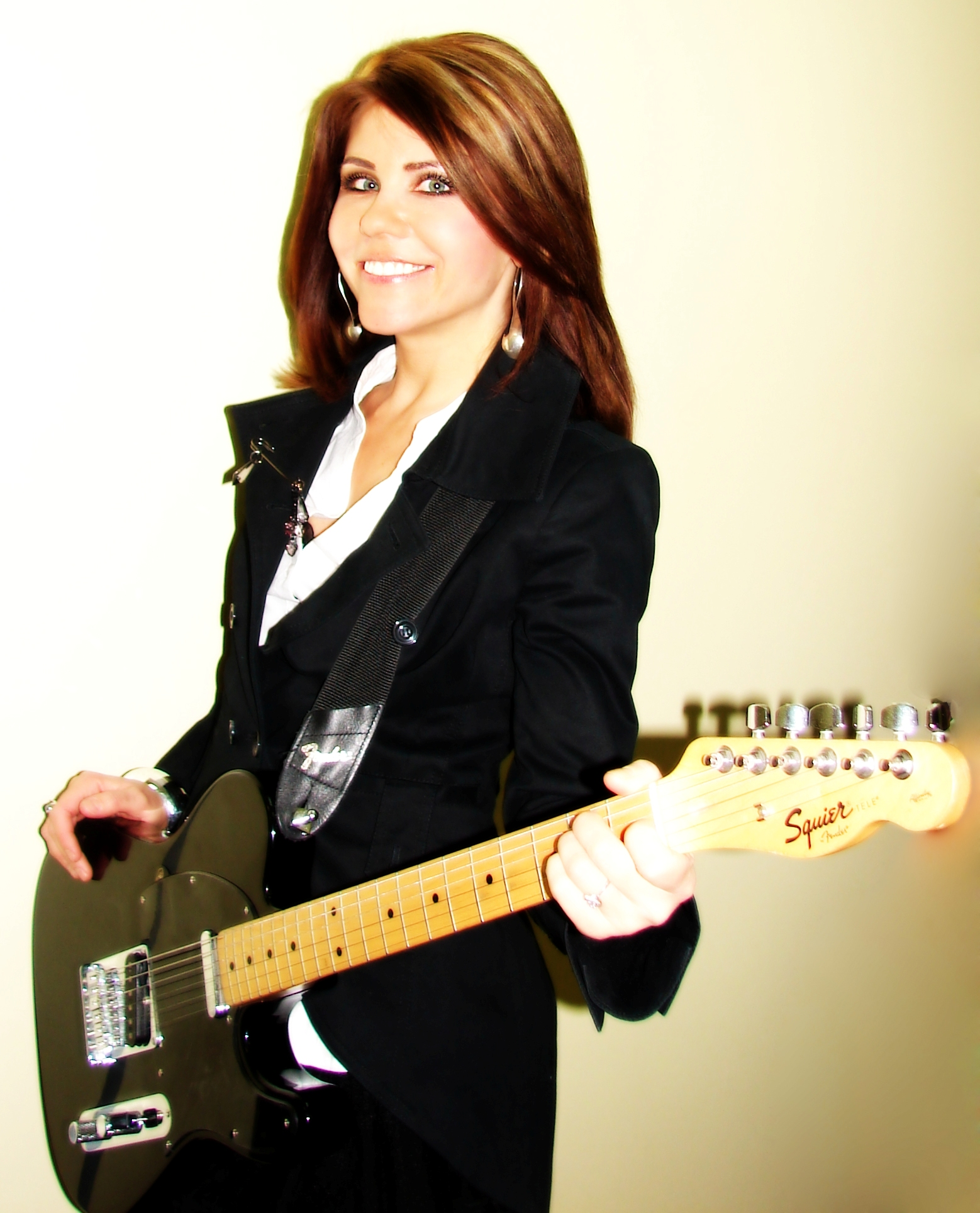 Анастасия Макаревич, за кулисами "Супердискотеки 90-х" СК "Олимпийский" 09.03.2013г.